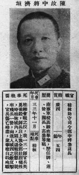 抗戰軍人忠烈錄第一輯中的烈士遺像